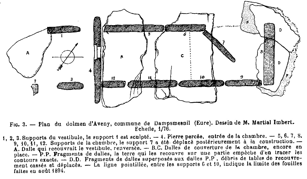 Vue en plan de l'allée couverte de Dampsmesnil relevé par Martial Imbert lors de ses fouilles en 1894